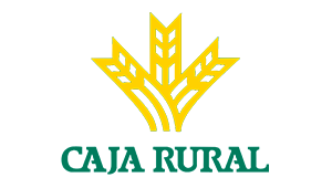 Caja Rural